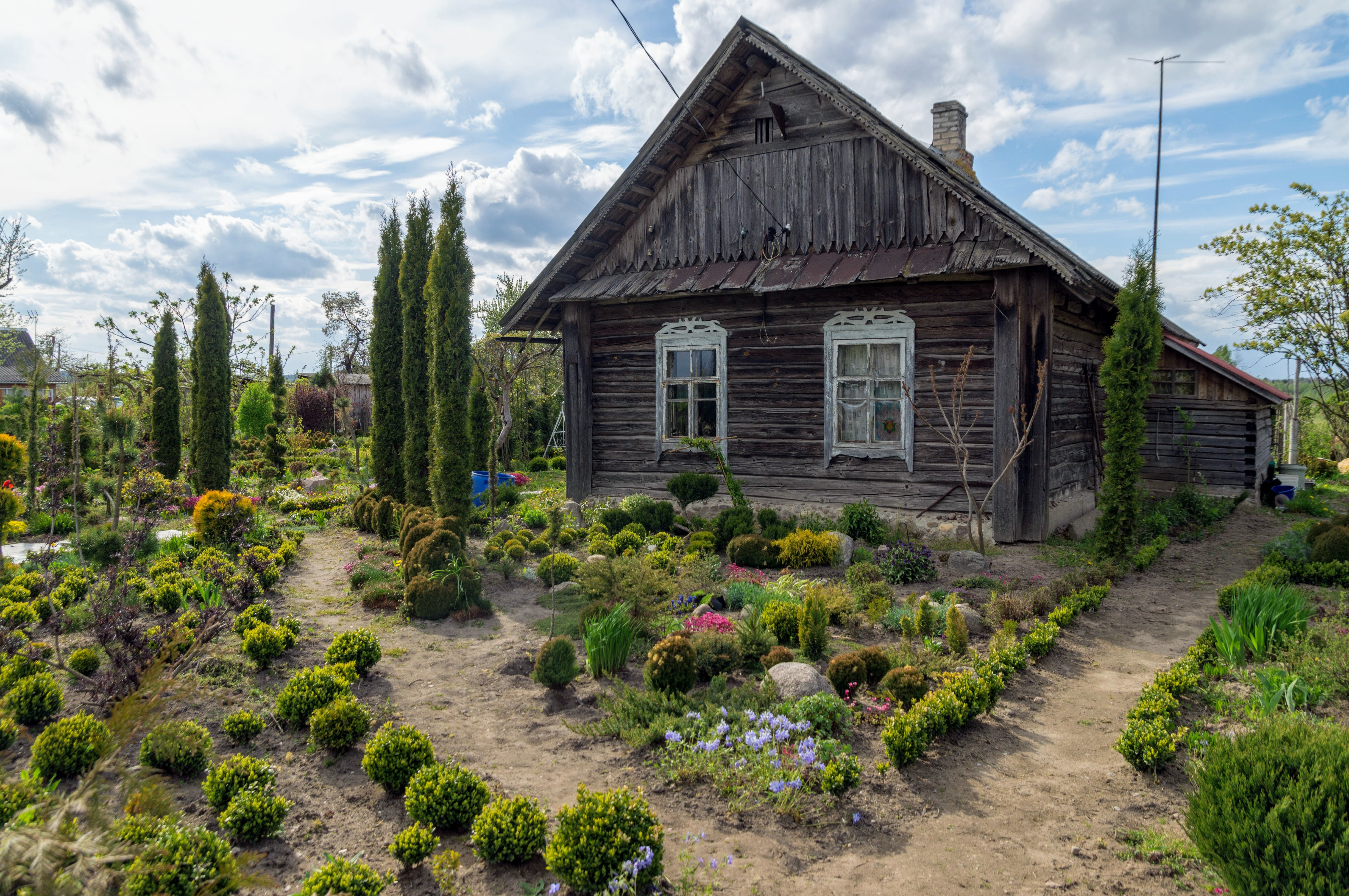 Крайскія Пасекі. Мясцовая аранжэрэя